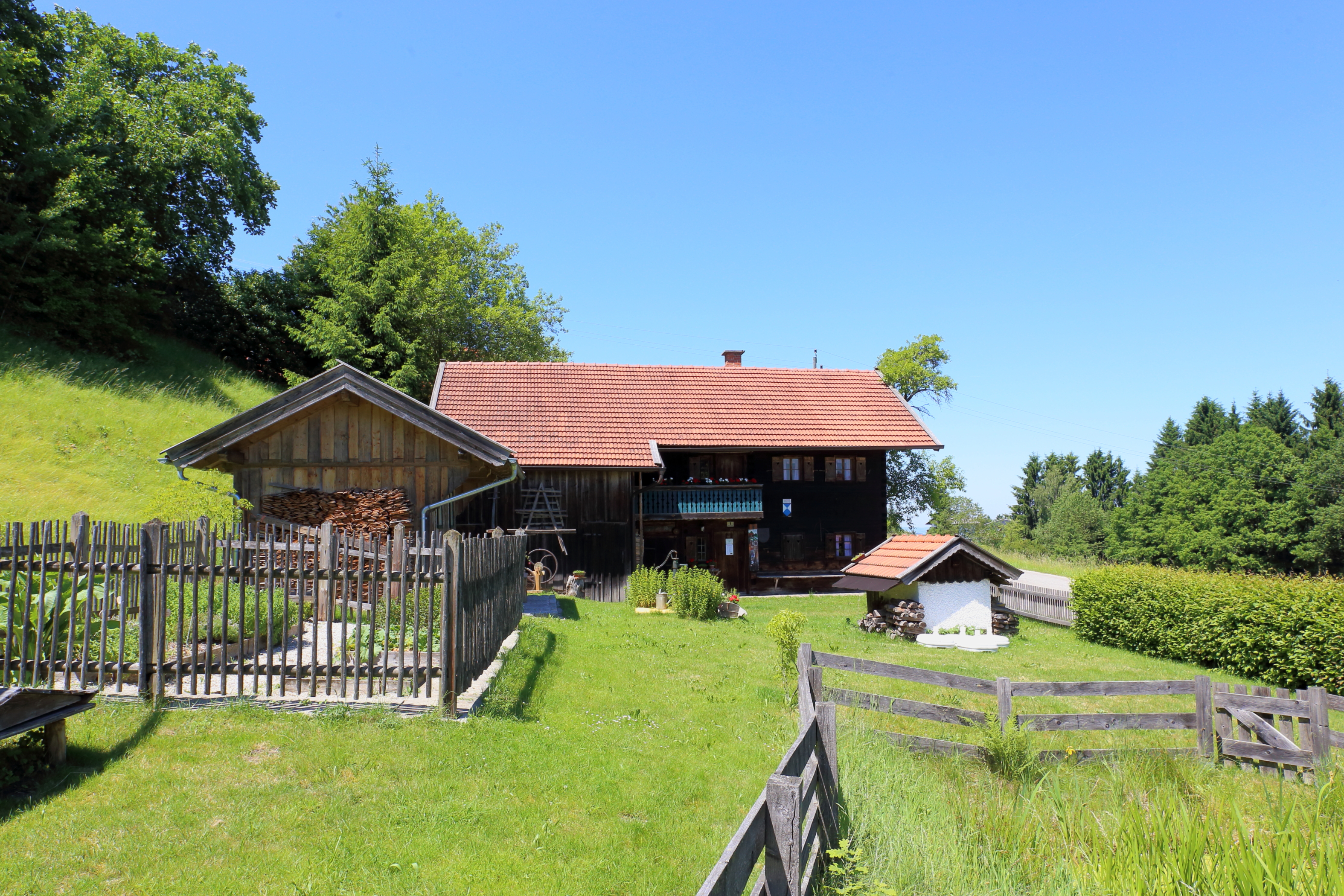 Das Heimatmuseum, Beandhaus bzw. Pointhaus bezeichnet, der oberösterreichischen Gemeinde St. Johann am Walde. 1987 erwarb die Gemeinde diese Sölde und errichtet darin ein Heimatmuseum.